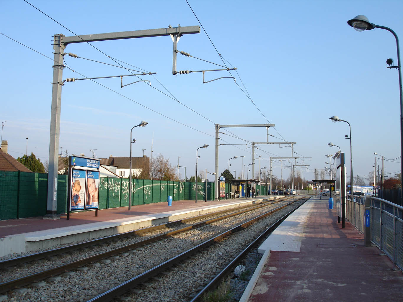 Station Rougemont — Chanteloup du T4 à Sevran (Seine-Saint-Denis).